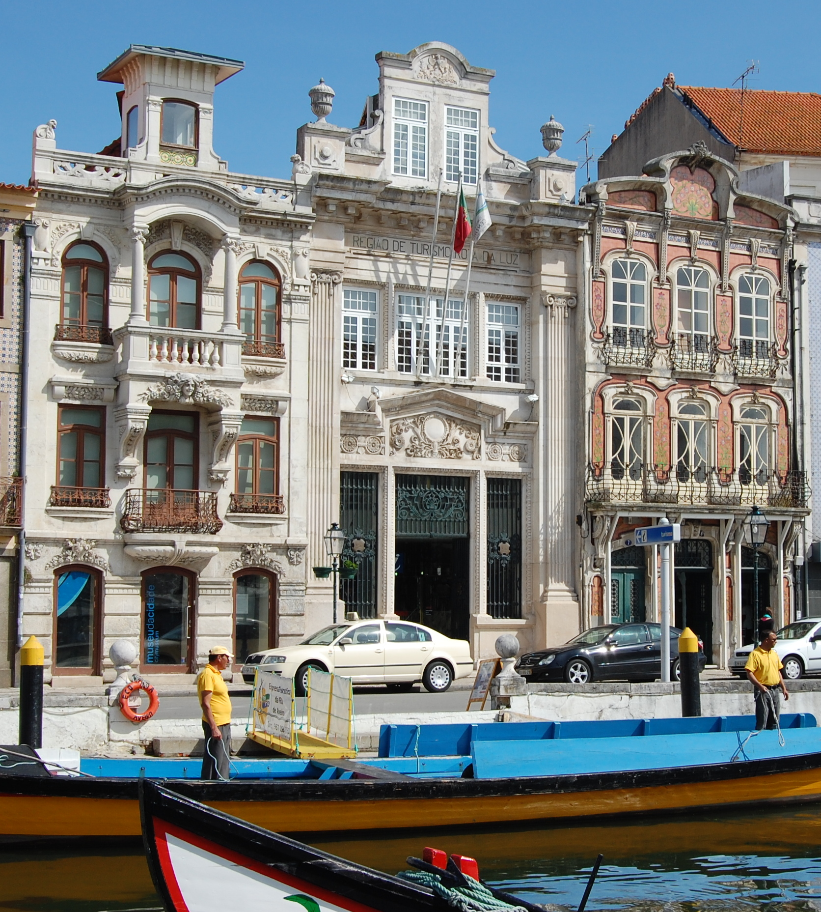 Casa da Cooperativa Agrícola (edifício Arte Nova) e os barcos tradicionais do porto de Aveiro